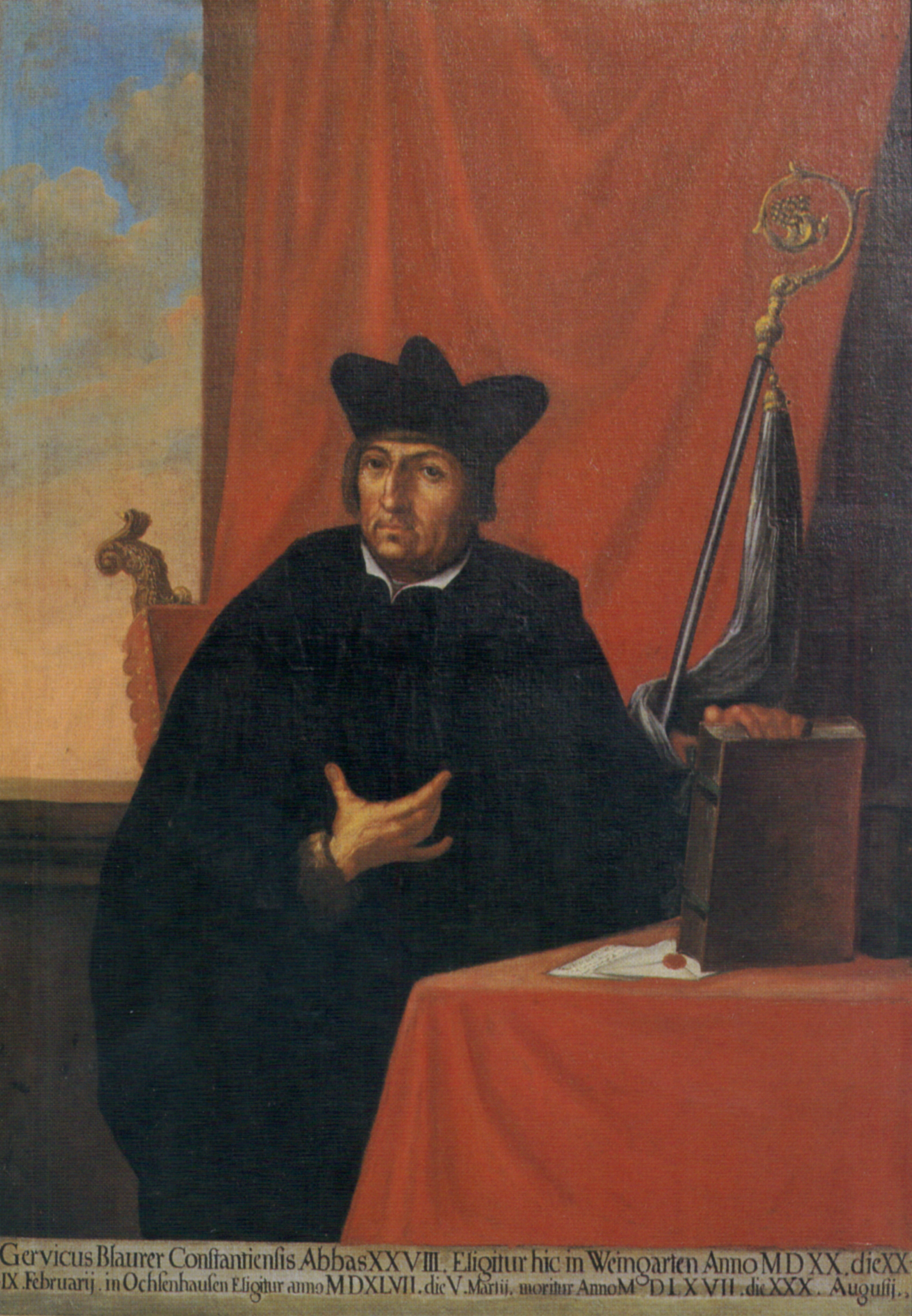 Posthumes Bildnis des Weingartener Abts Gerwig Blarer (1495–1567)